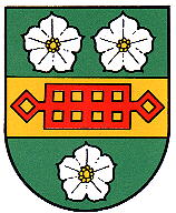 Wappen von Gemeinde Arnreit